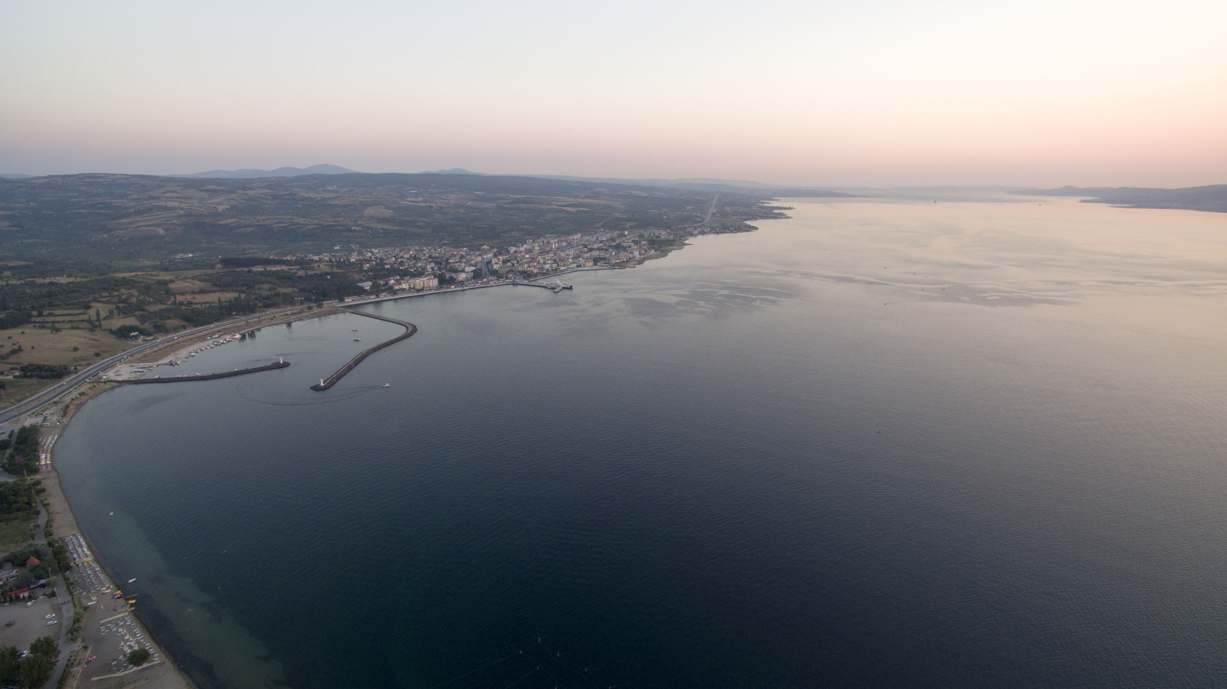 Dalyan Mahallesinden Lapseki